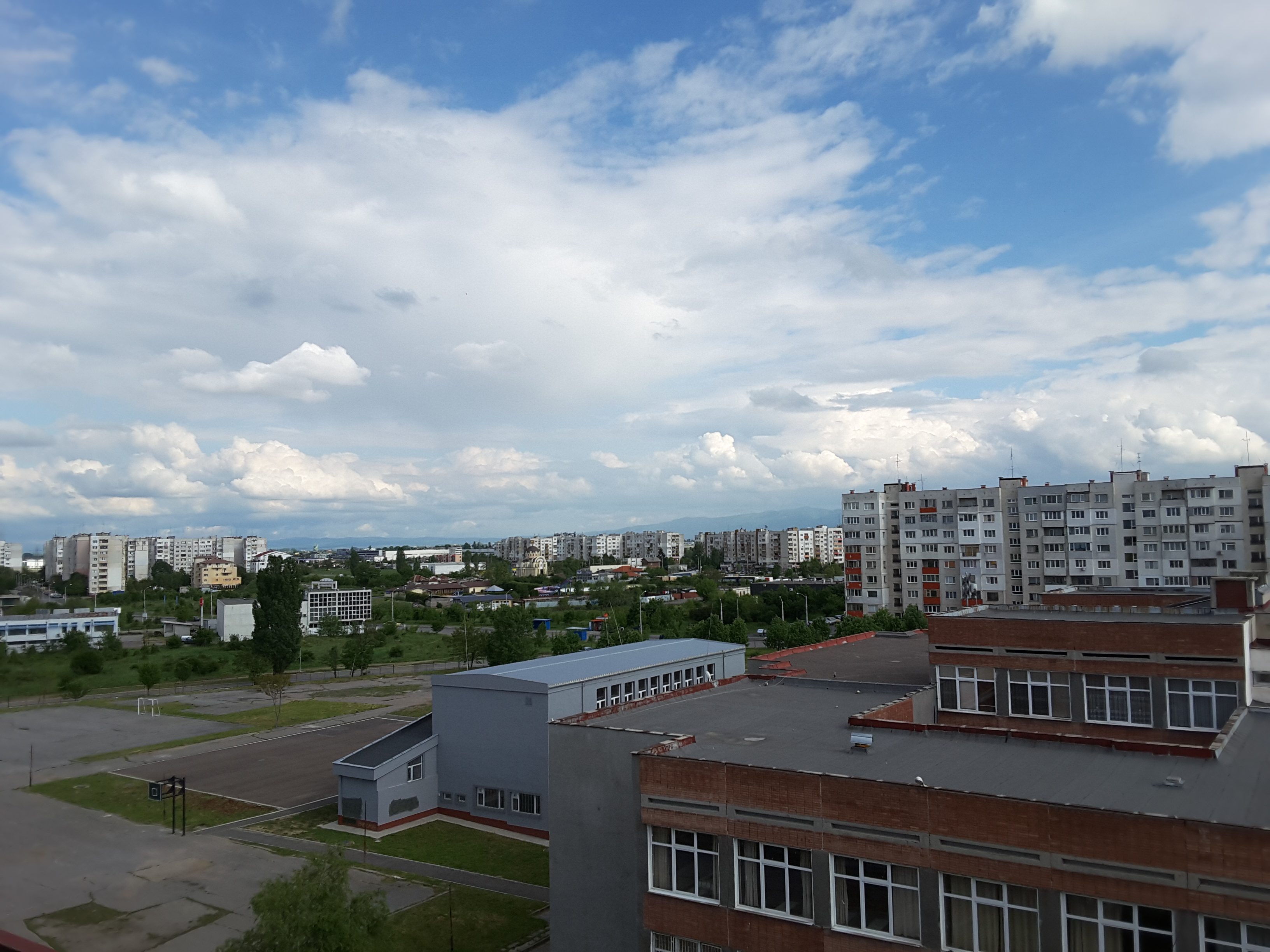 Левски Г снимка